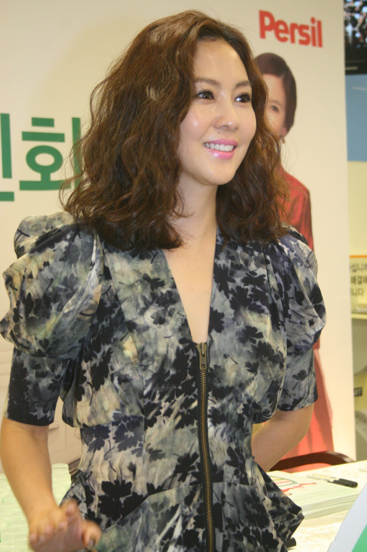 퍼실 파워젤 출시 기념 김남주 팬 사인회